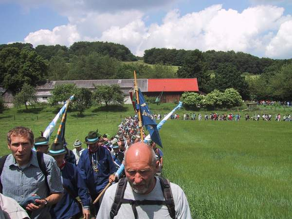 Briloner Schnade